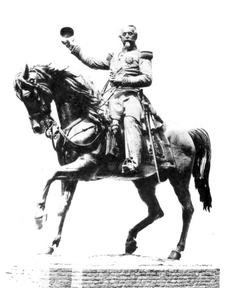 Statua equestre di Napoleone III sulla sommità del monumento di Milano